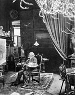 Rudolf Koller